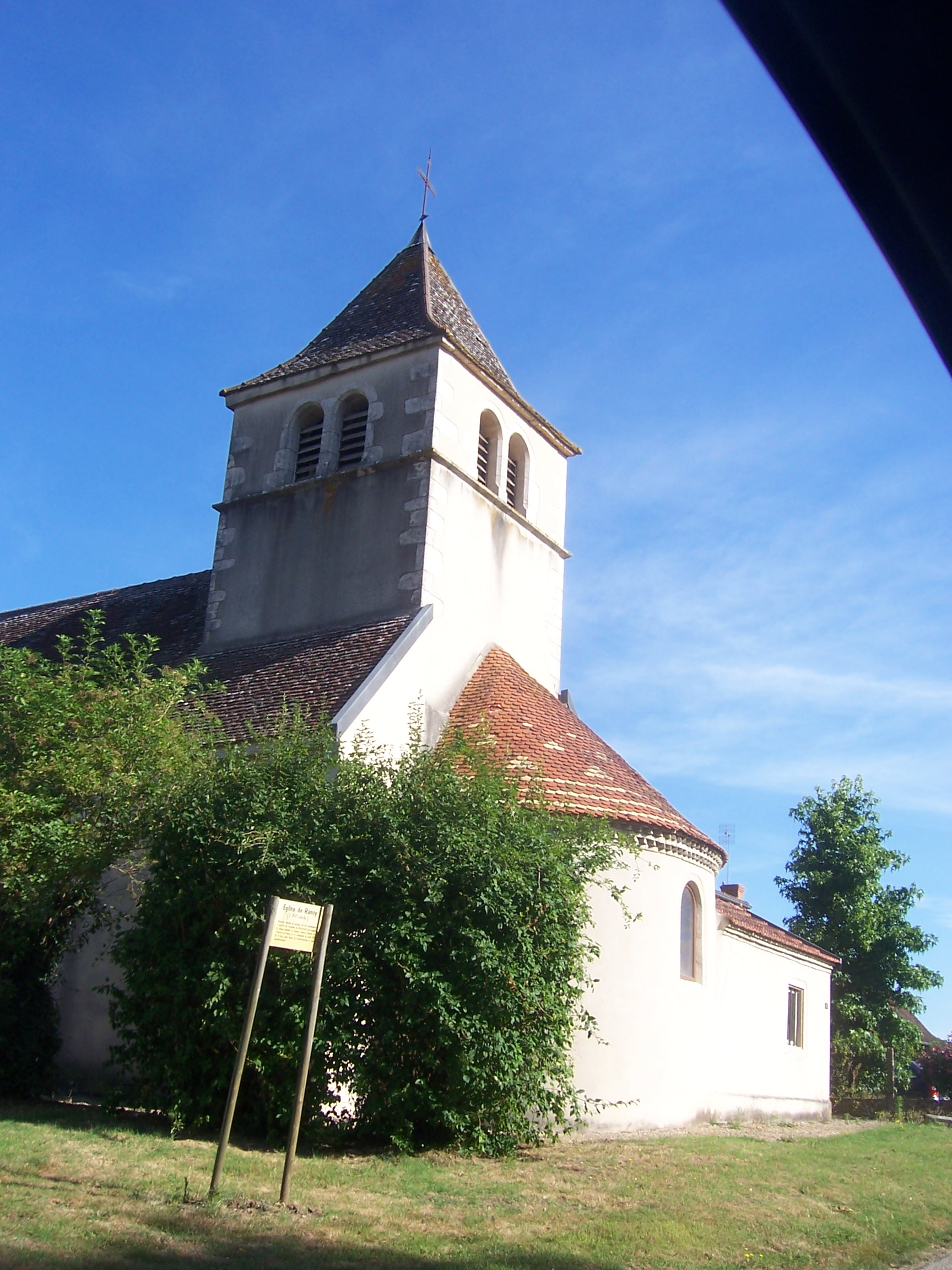 Eglise de Rancy